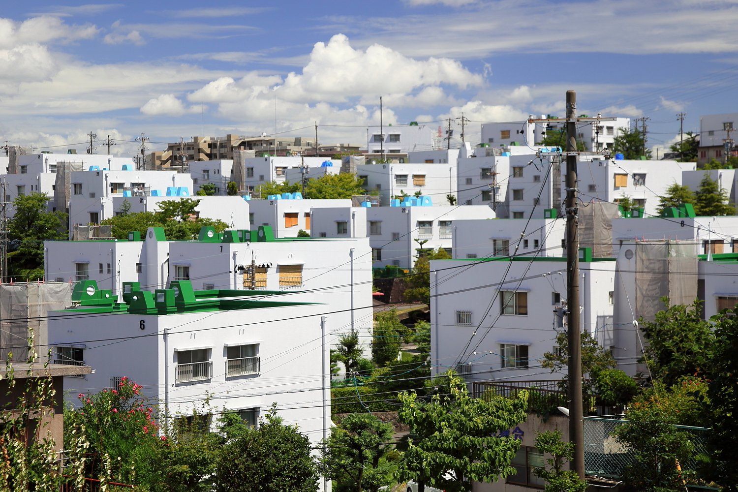 高根山より有松グリーンハイツを望む（名古屋市緑区、2012年）